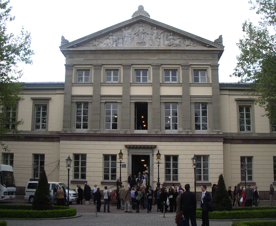 Göttingen, Germany: Aula der Universität Göttingen am Wilhelmsplatz